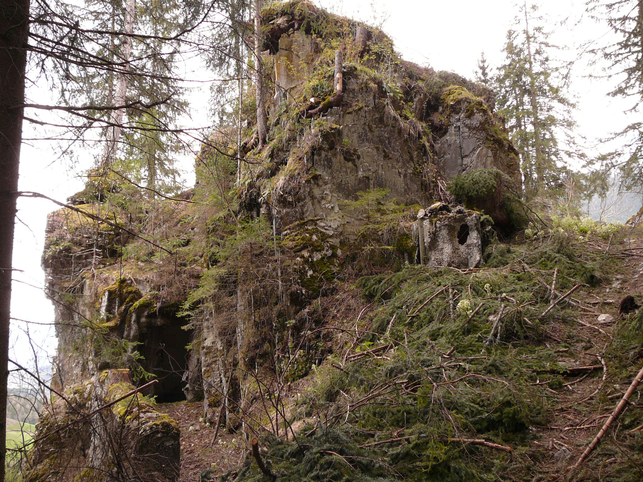 opera 8, sbarr drava